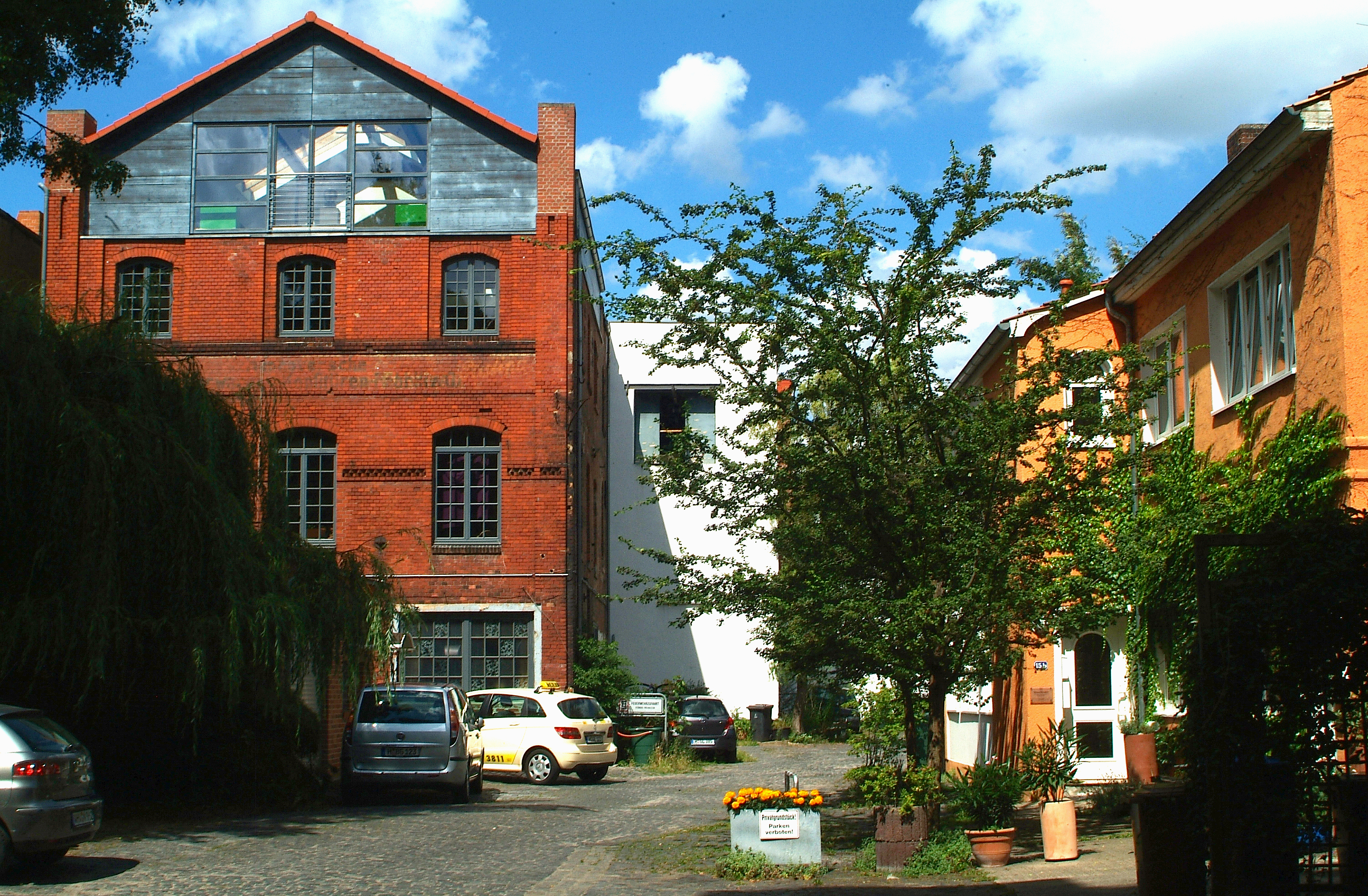 Blick über den Hof des Kulturzentrums Eisfabrik in der Südstadt von Hannover in Richtung Commedia Futura; das Gebäude links im Vordergrund läßt noch die Beschriftung "Hannoversche Zuckerwaren- und Konfitüren-Fabrik-Gesellschaft" erkennen ...]